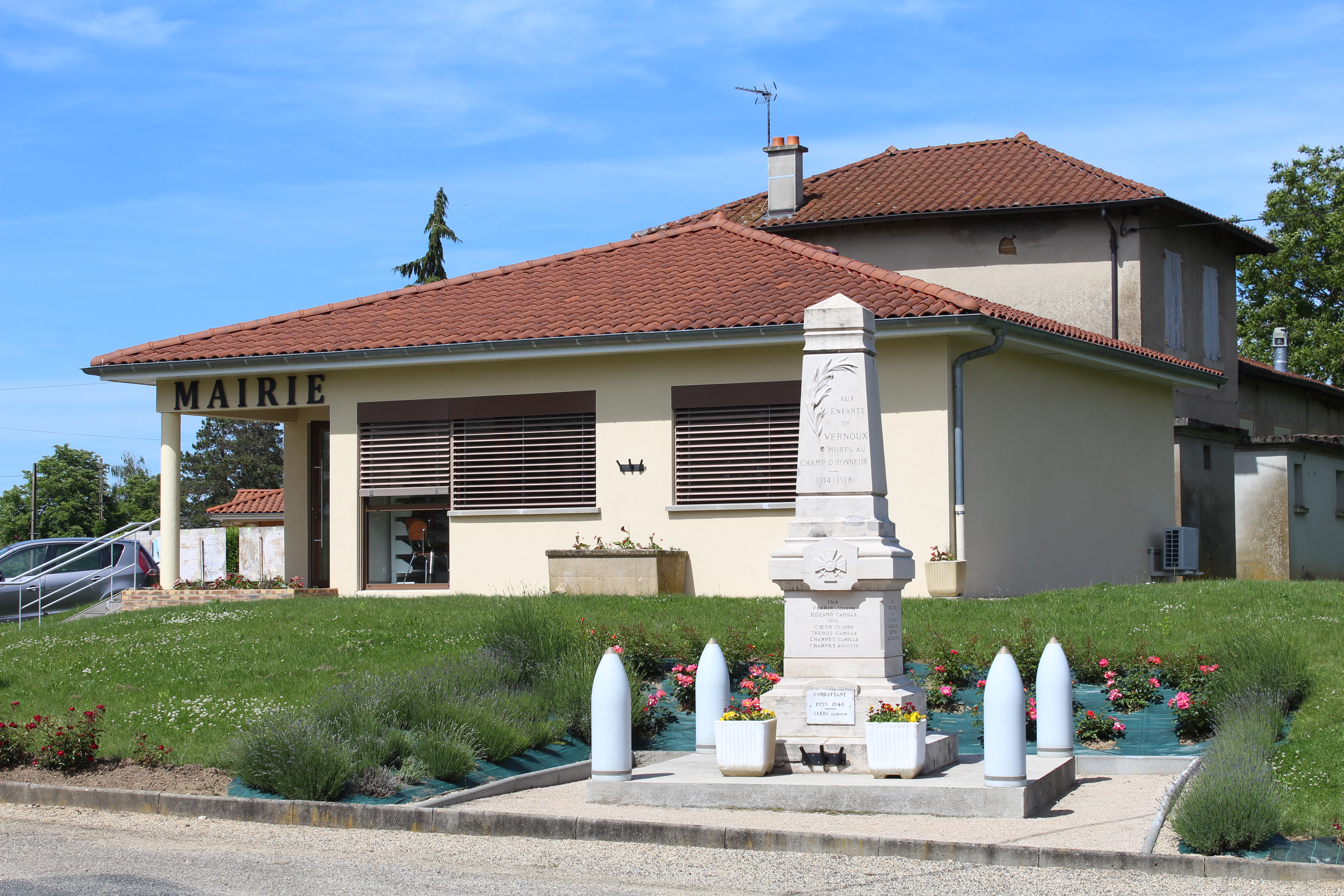 Mairie de Vernoux.